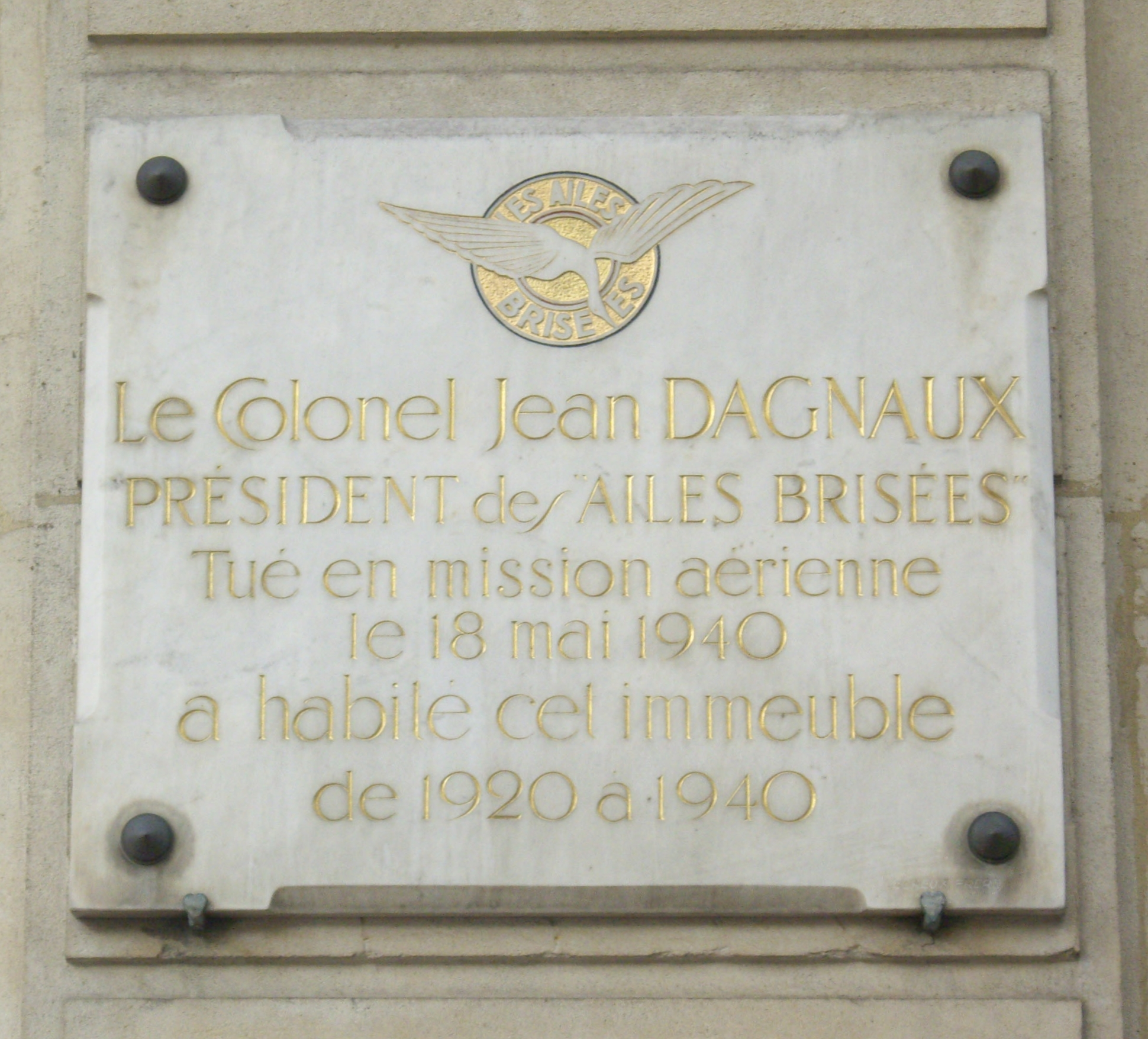 Plaque commémorative, 86 boulevard Malesherbes, Paris 8e. « Le colonel Jean Dagnaux, président des Ailes Brisées, tué en mission aérienne le 18 mai 1940, a habité cet immeuble de 1920 à 1940. »